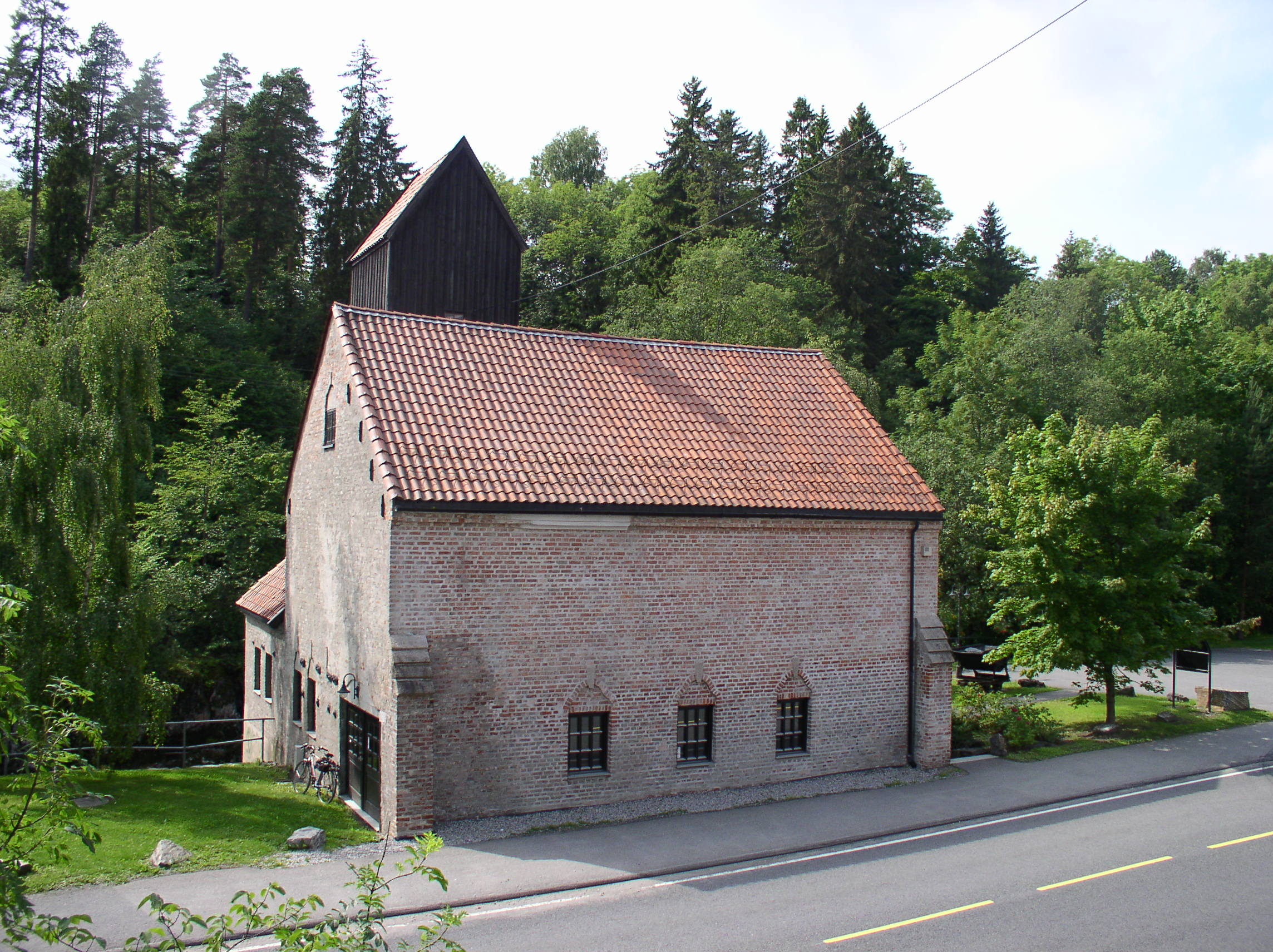 Franzefoss kalkmølle ved Sandvikselva i Bærum.